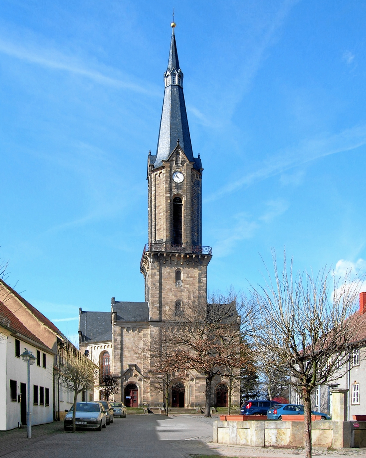 Dorfkirche Sankt Viti in Wechmar (Thüringen)